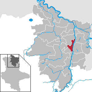 Arneburg im Landkreis Stendal, Sachsen-Anhalt